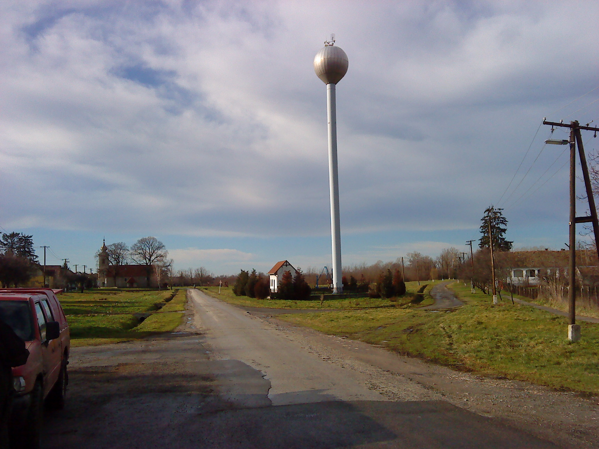 Kórós központja